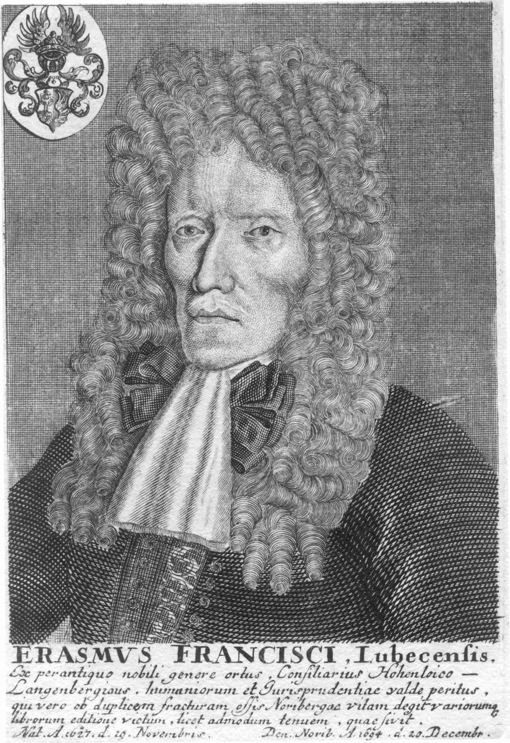 Portrait of Erasmus Finx (Erasmus Francisci)